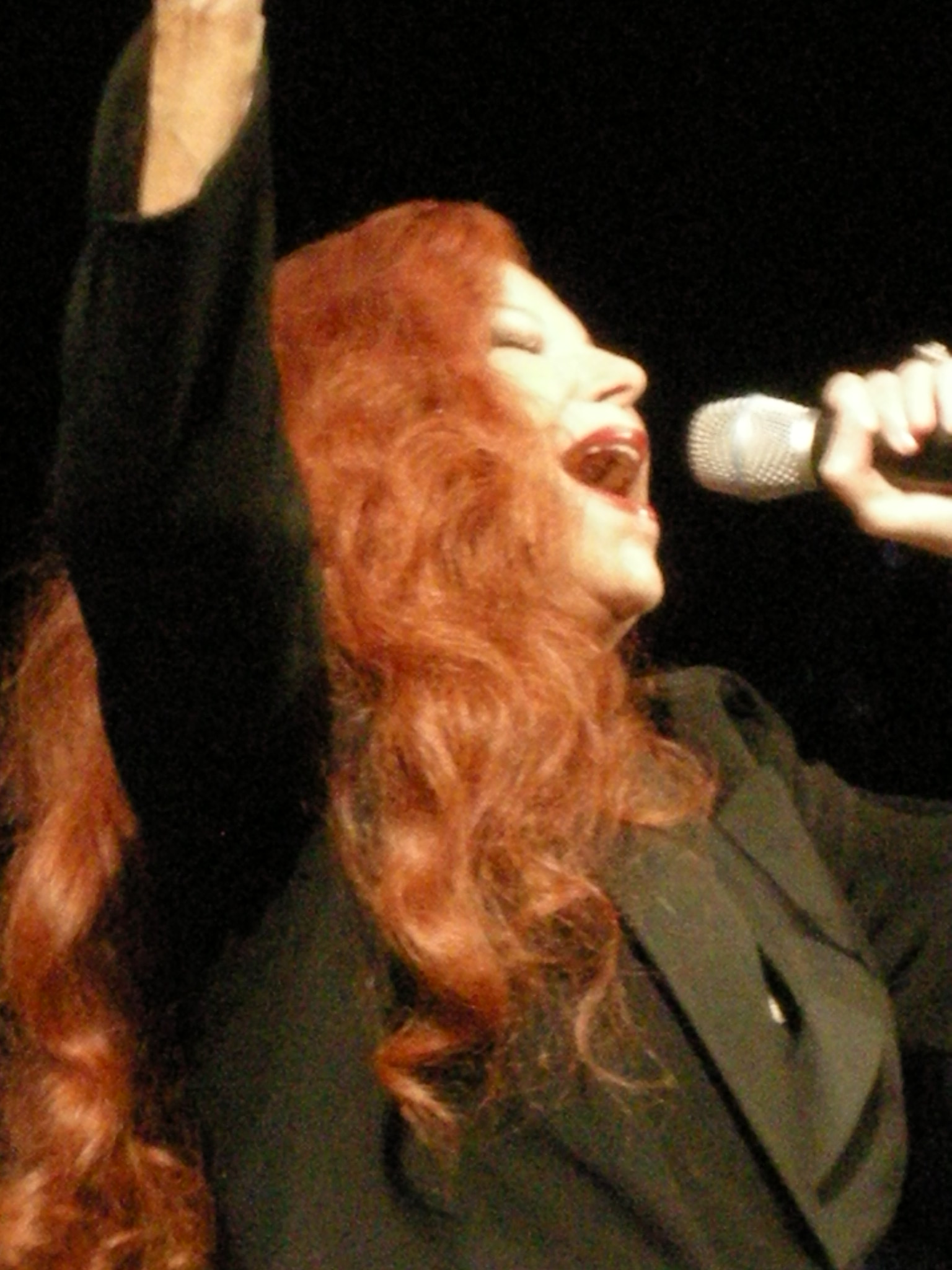 Milva in Pistoia 31-01-09